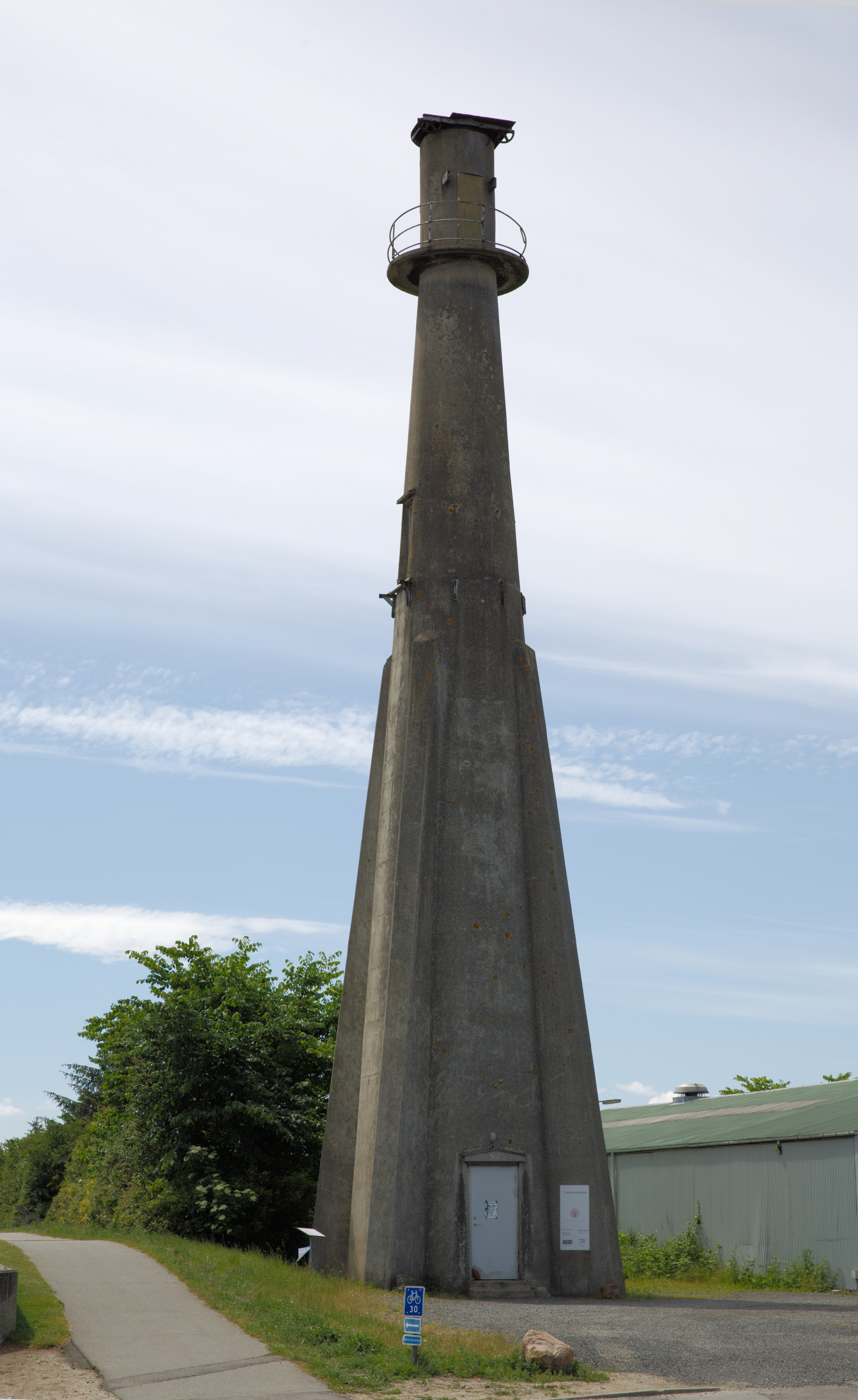 Aeromøllen Bogense